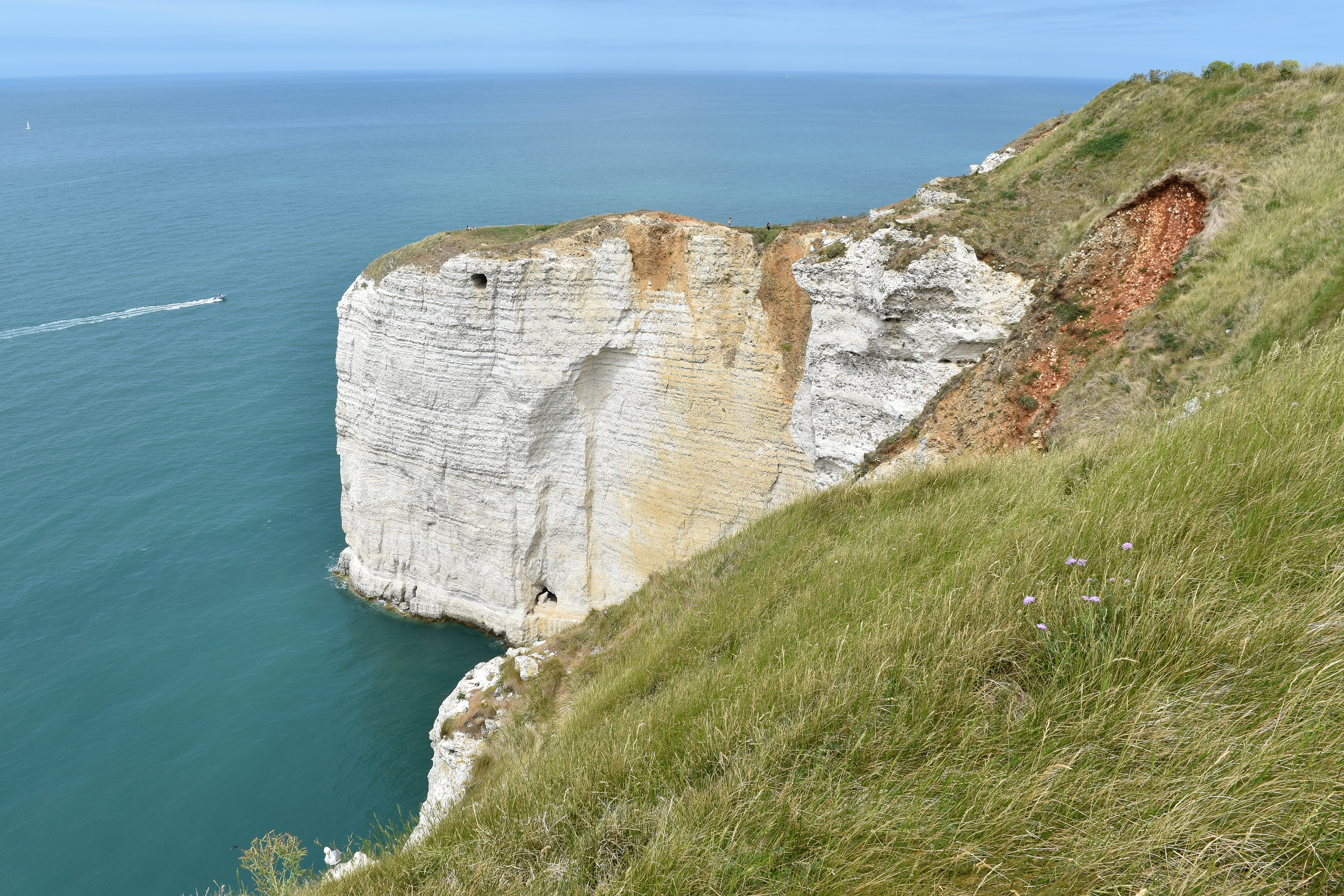 Falaise d'Etretat , Seine Maritime, Normandie, France